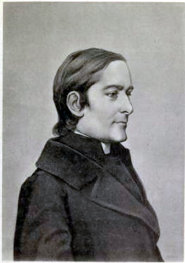 Andreas Niedermayer, deutscher Priester, Autor, Historiker